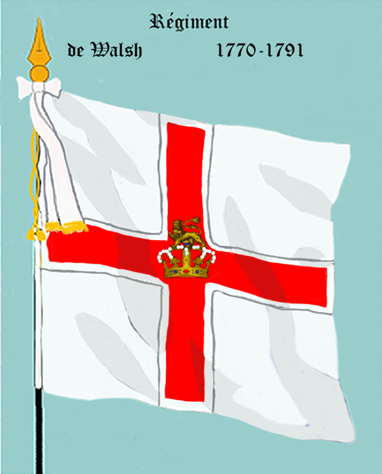 Ordonnanzfahne eines Fremdenregiments im königlich französischen Dienst. - Entnommen und überarbeitet aus: „LES UNIFORMES ET LES DRAPEAUX DE L'ARMÉE DU ROI“ Marseille 1899. (Drapeau d'Ordonnance d' un régiment etranger au service française.)